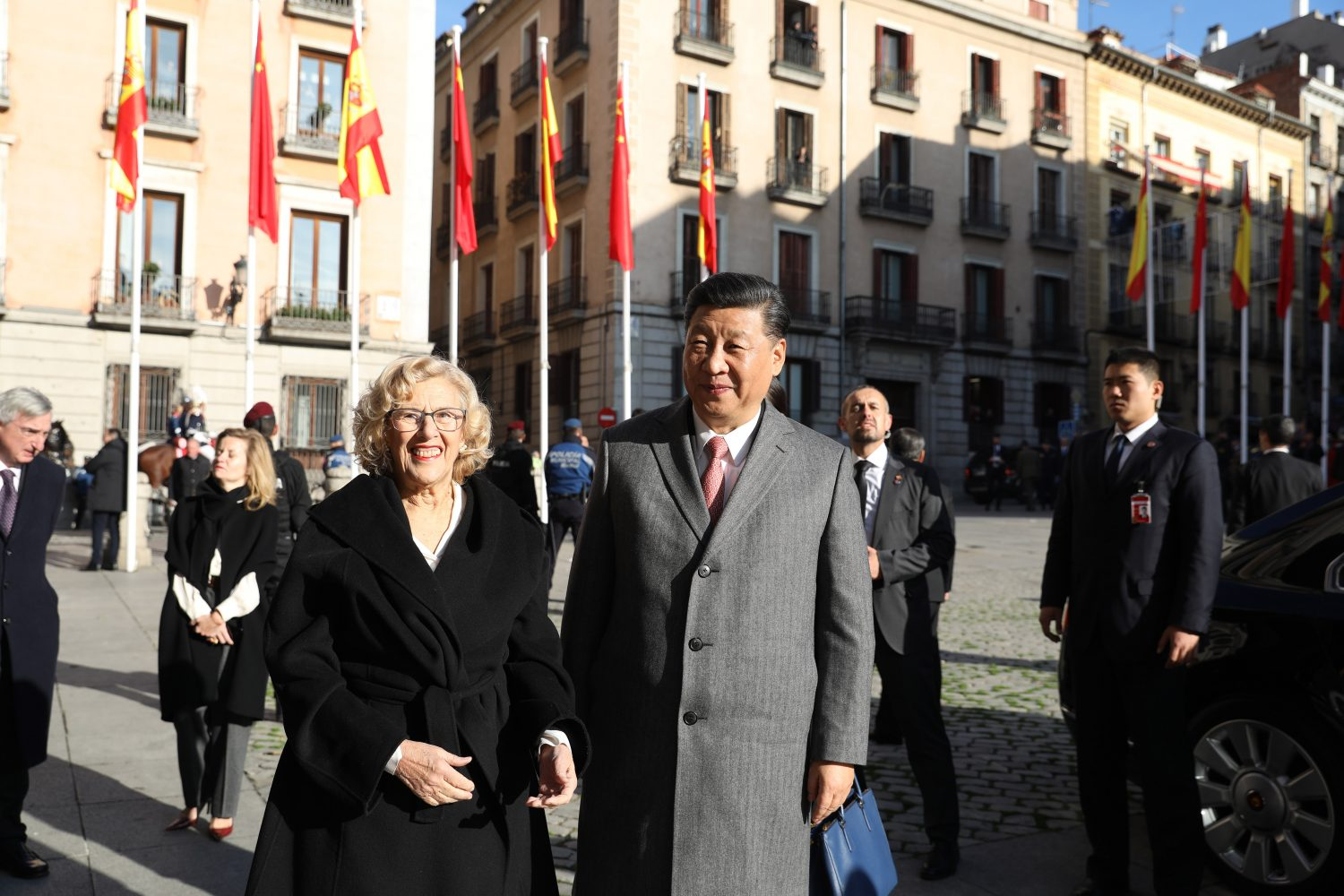 La alcaldesa entrega la Llave de Madrid al presidente chino en su visita al Ayuntamiento. El símbolo, en palabras de Xi Jinping, servirá para abrir “aún más la puerta de la amistad y el intercambio” entre los dos países y sus ciudades. 28/11/2018. Manuela Carmena, alcaldesa de Madrid ha entregado esta mañana, miércoles 28 de noviembre, la Llave de oro de la ciudad al presidente Chino, Xi Jinping, que se encuentra de visita oficial en Madrid, en lo que es su primera parada del viaje a Europa que realiza tras su nombramiento al frente del país asiático. En la Casa de la Villa, Carmena ha subrayado la importante presencia de la comunidad china en la ciudad, lo que ha llevado al Ayuntamiento de Madrid a incorporar “como una fiesta suya”, la celebración del Año Nuevo Chino, que ya se ha consolidado en el calendario cultural madrileño.